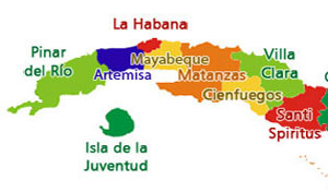 Proyecto de División de la Provincia de La Habana en Cuba en dos Provincias